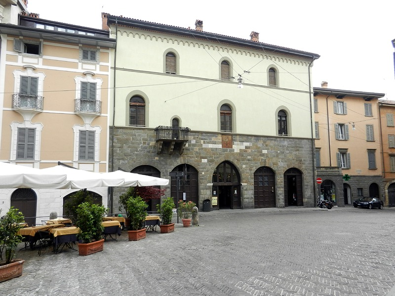 Bergamo - Stazione superiore della Funicolare per Città Alta